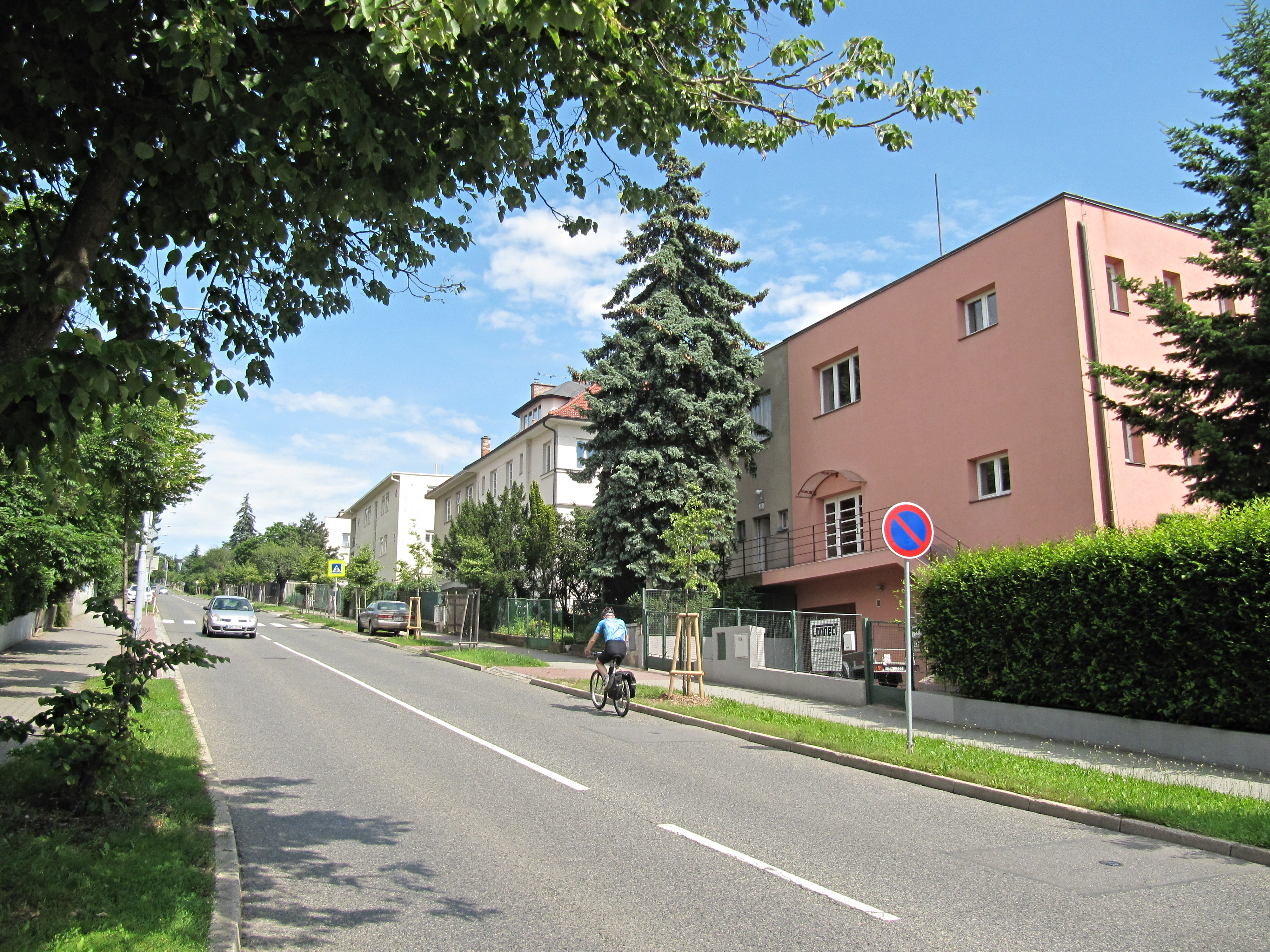 Brno, Lipová ulice